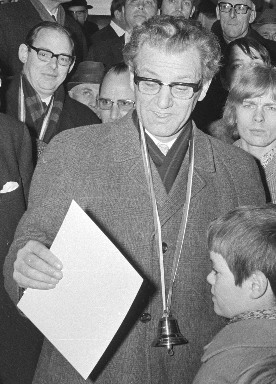 Collectie / Archief : Fotocollectie Anefo Reportage / Serie : [ onbekend ] Beschrijving : Actie "Noodklok Oost-Groningen". 28 Kamerleden in Winschoten, Oost-Groningen, voor slecht economische situatie; kamerleden in menigte; Sake van der Ploeg (PvdA) Datum : 14 januari 1971 Locatie : Groningen, Winschoten Trefwoorden : acties, bezoeken, economie, volksvertegenwoordigers Persoonsnaam : Ploeg Sake Van Der Instellingsnaam : Tweede Kamer Fotograaf : Verhoeff, Bert / Anefo Auteursrechthebbende : Nationaal Archief Materiaalsoort : Negatief (zwart/wit) Nummer archiefinventaris : bekijk toegang 2.24.01.05 Bestanddeelnummer : 924-1721